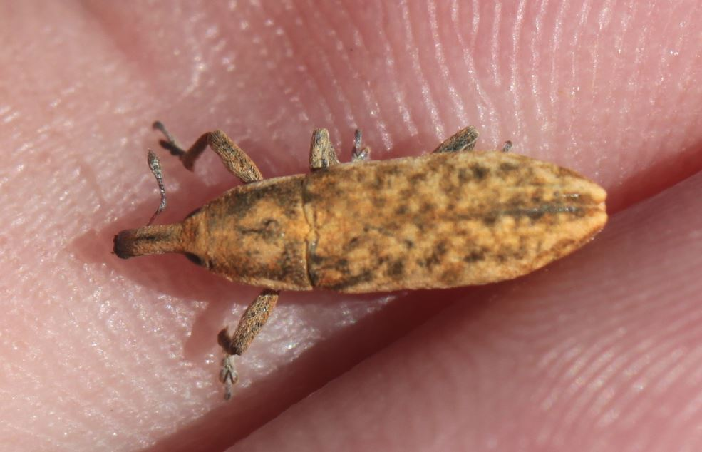 Rüsselkäfer Lixus subtilis am 11. September 2019 in Walldorf/Baden